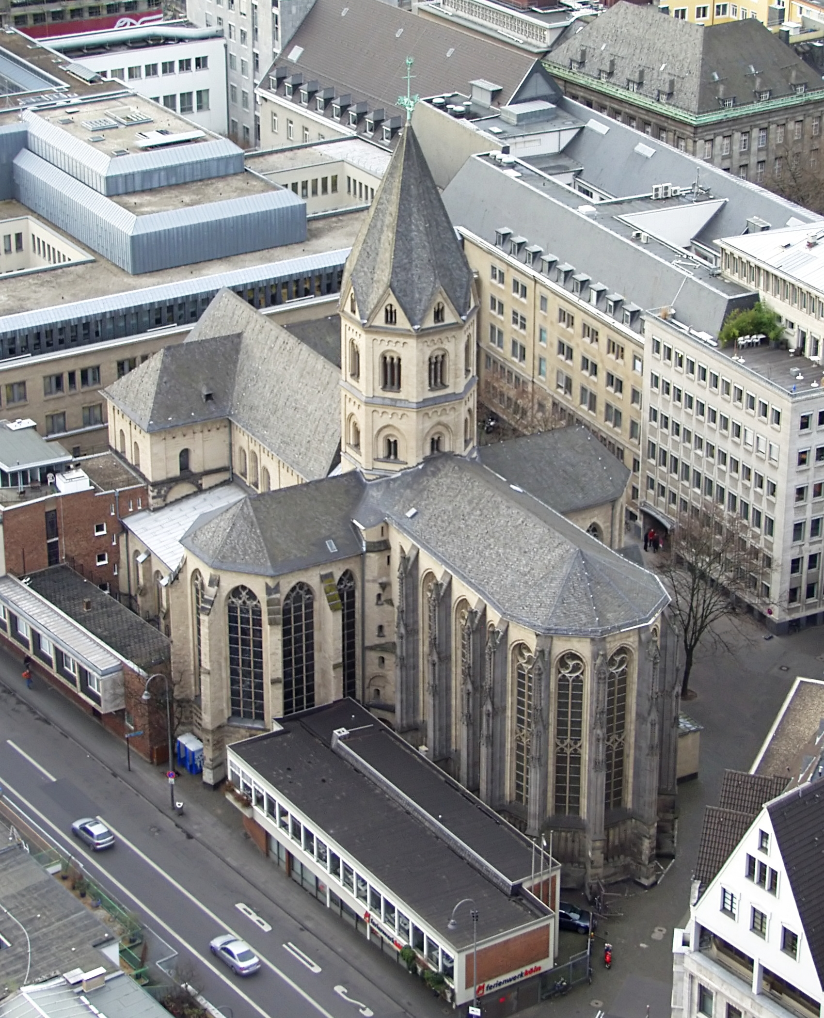 St. Andreas (Köln), vom Südturm des Kölner Domes.